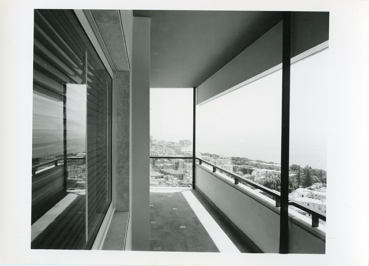 Napoli. Edificio Decina in Via Parco Grifeo su progetto degli architetti Giulio De Luca e Michele Capobianco. Servizio fotografico : Napoli, 1978 / Paolo Monti. - Fototipi: 14 : Positivo b/n, gelatina bromuro d'argento/ carta, provino a contatto da pellicola 10x12. - ((Al verso delle stampe manoscritti i numeri di negativo corrispondenti: 59-71, 78. La suddetta serie è contenuta nella scatola identificata con la numerazione 178; sul coperchio iscrizione manoscritta a pennarello: "Provini"